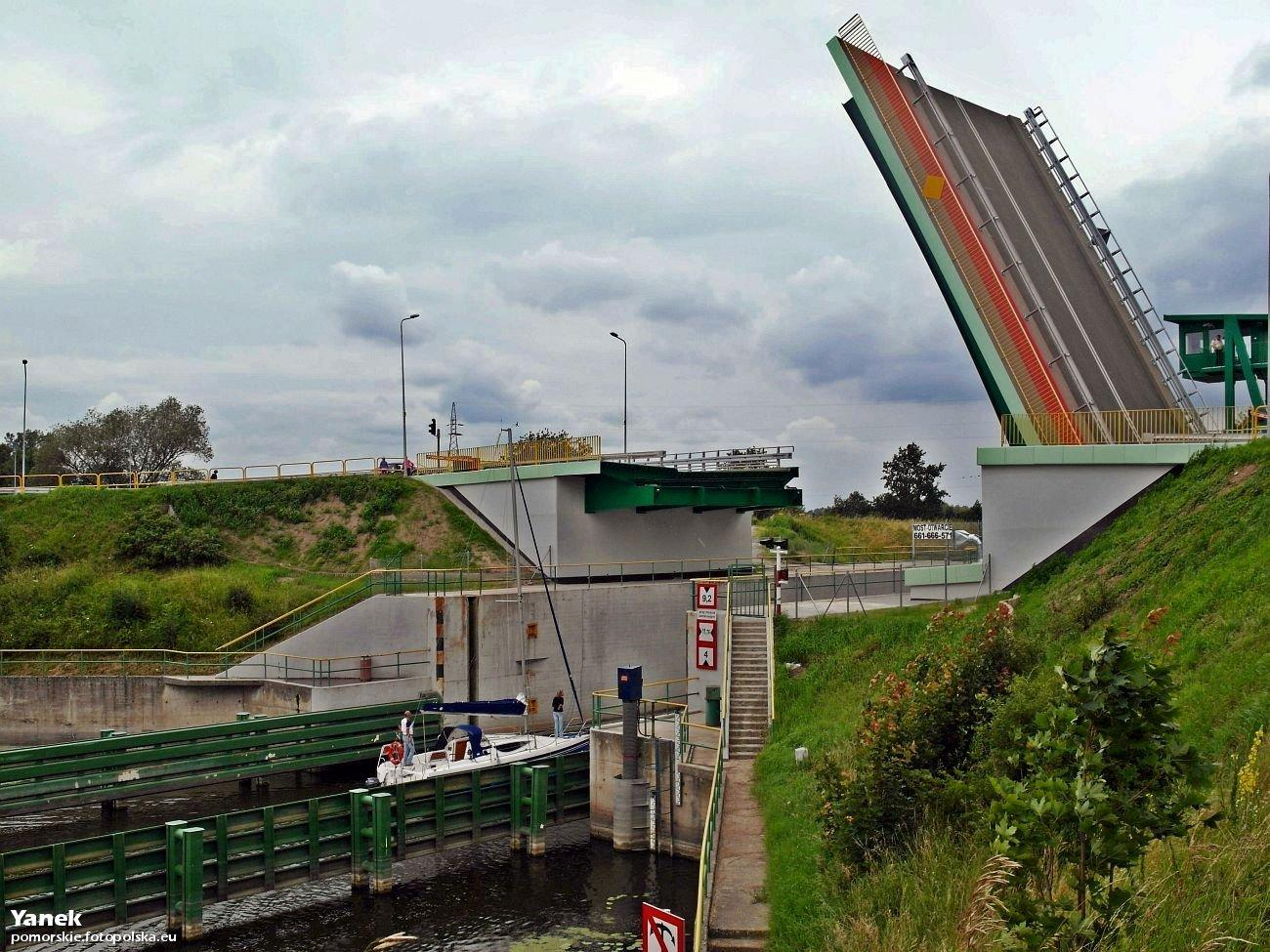 Most nad śluzą w Przegalinie w stanie uniesionym, celem przepuszczenia jachtu wpływającego na Martwą Wisłę.